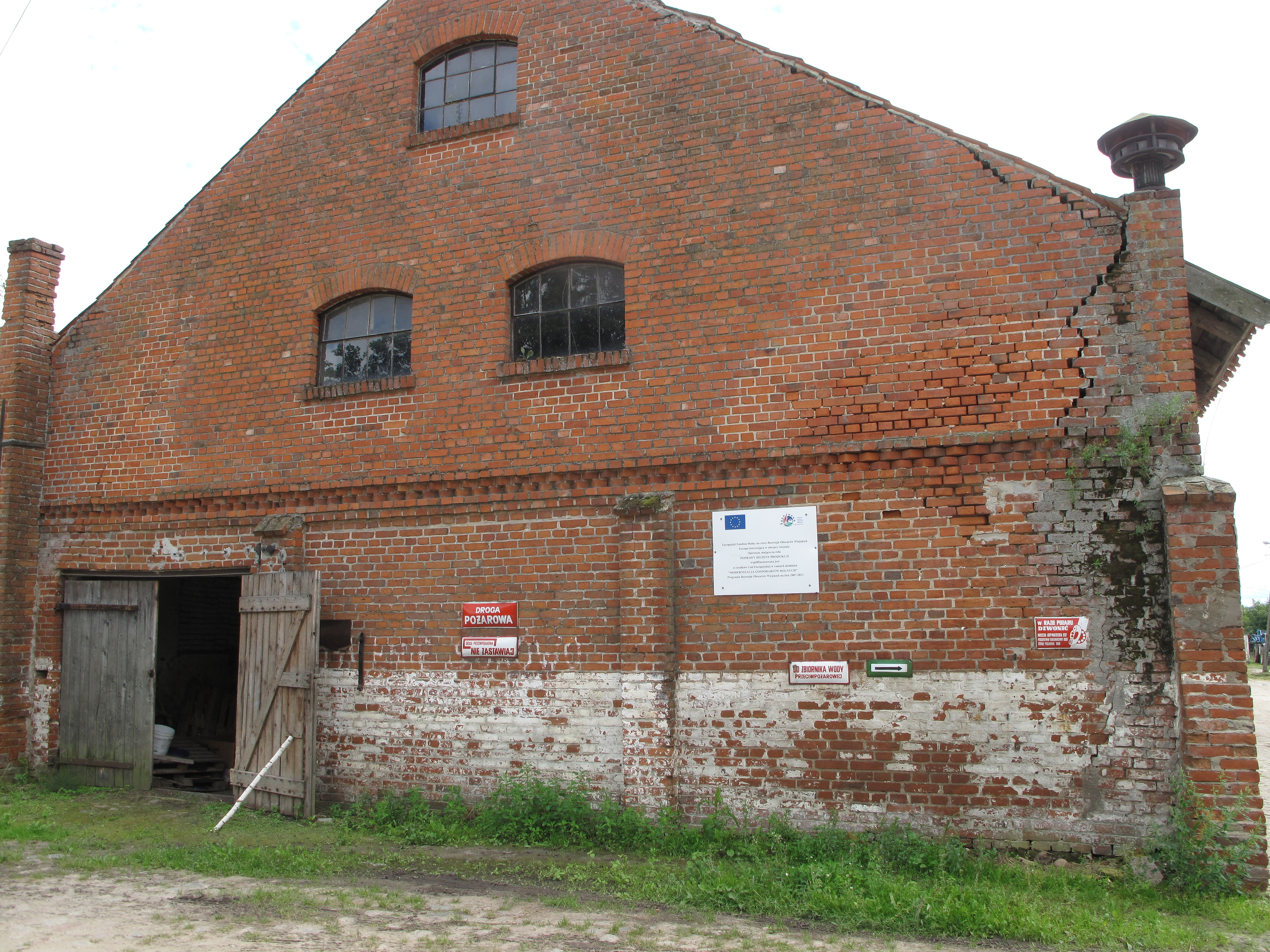 Zespół pałacowy z XIX/XX w. w Dąbrówce Małej (gmina Węgorzewo).